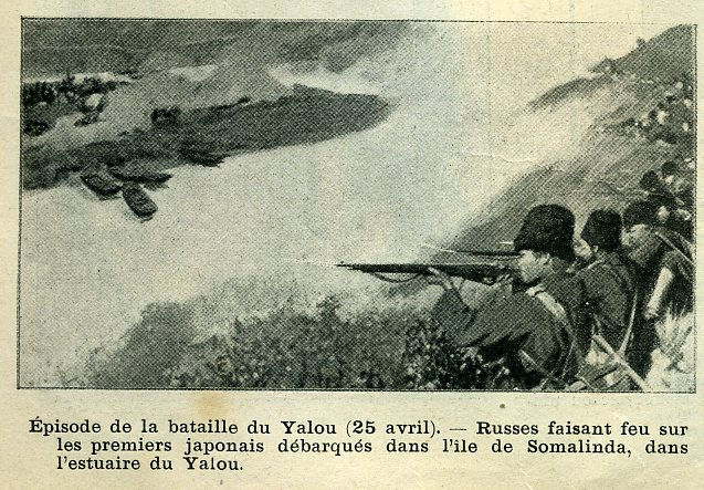 see picture